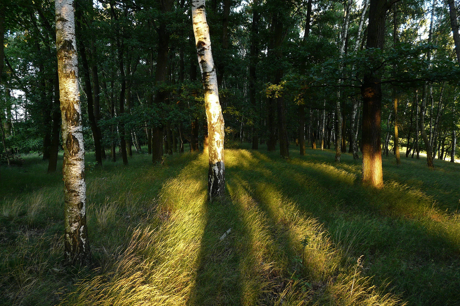 Vrchol Na Hrádku u Kněžmostu